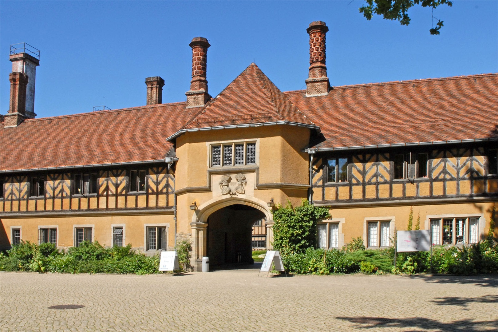 Facade principale du chateau de Cecilienhof, situé à Potsdam